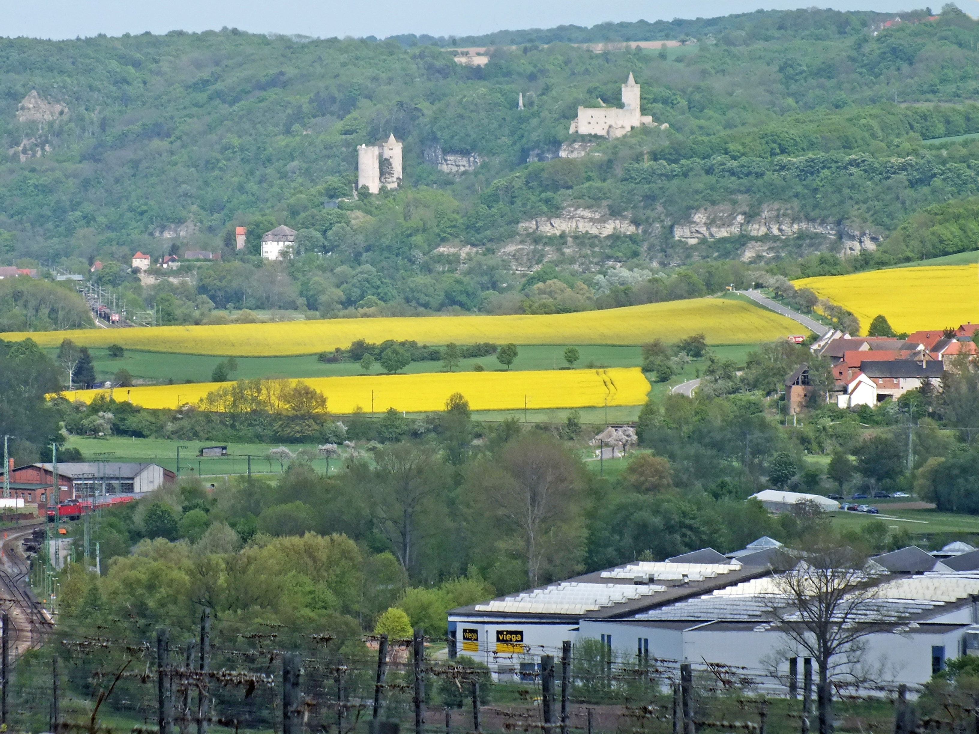 Teil der Niederlassung der Firma Viega in Großheringen (unten rechts) vor der Rudelsburg und Burg Saaleck